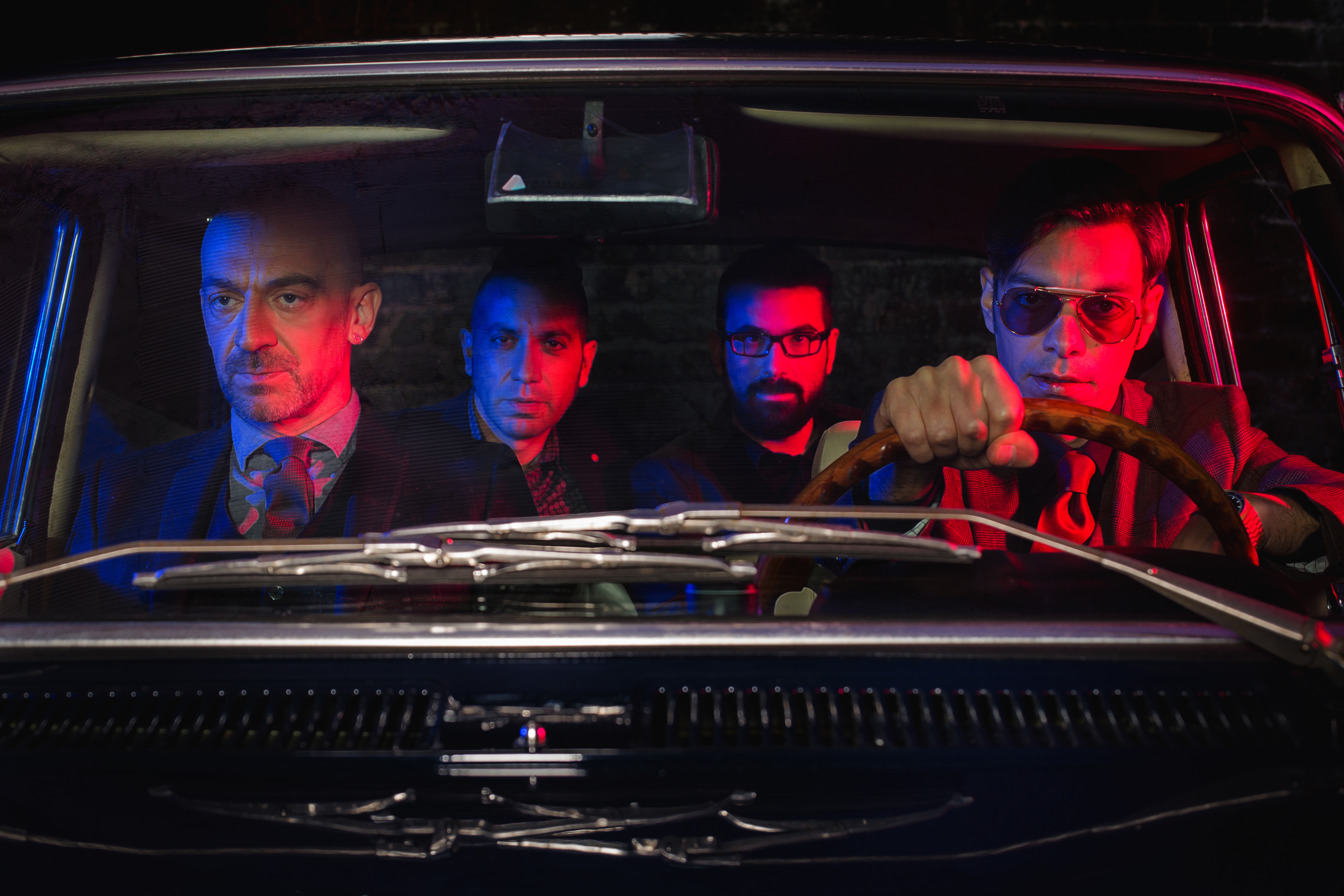 "Le storie che ci raccontiamo", set fotografico 2016